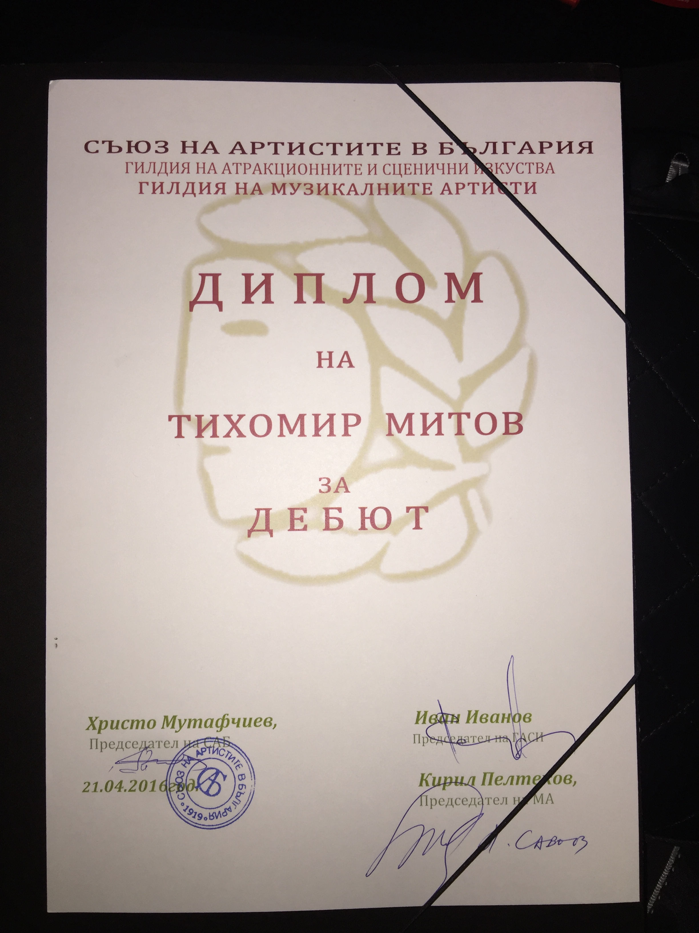 Диплома от Съюз на Артистите в България за Дебют на 2016 година